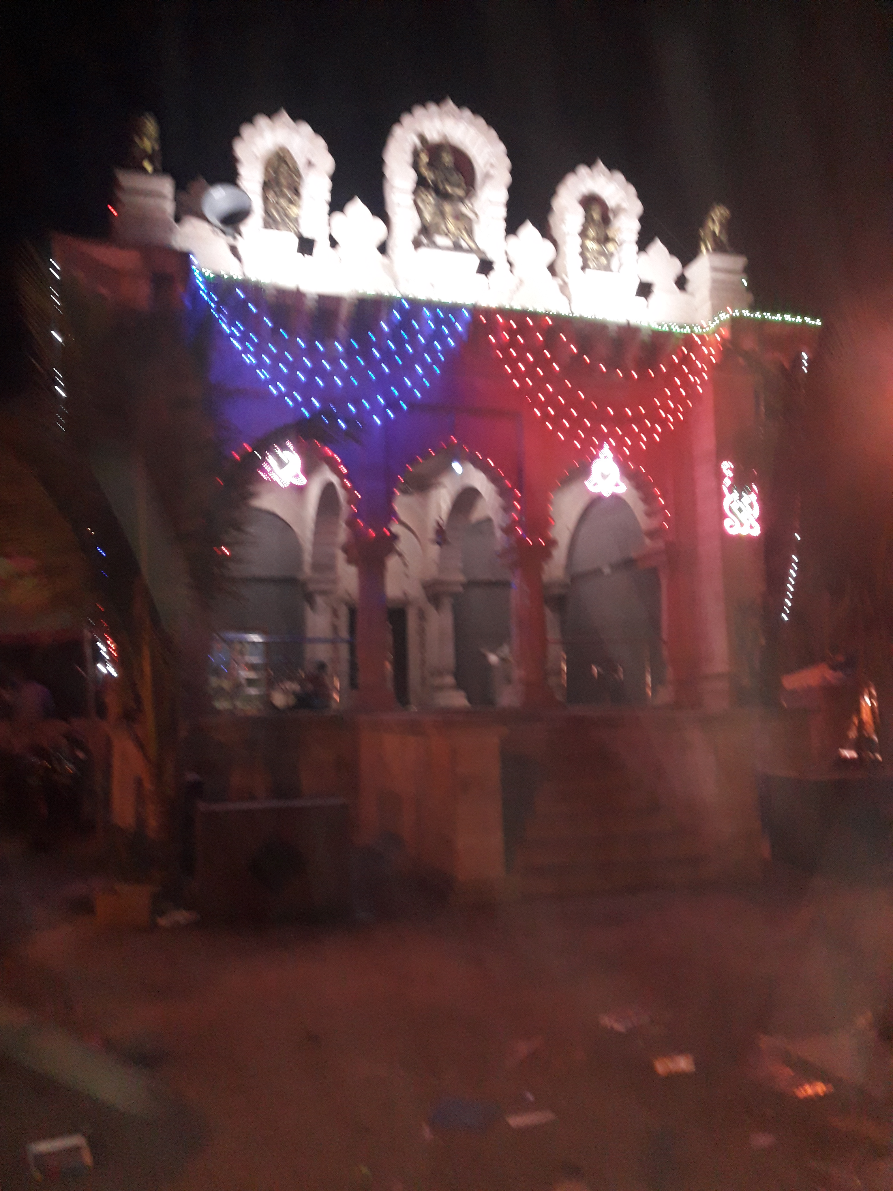 ಕನ್ನಡ: Yamanureshwara jatre